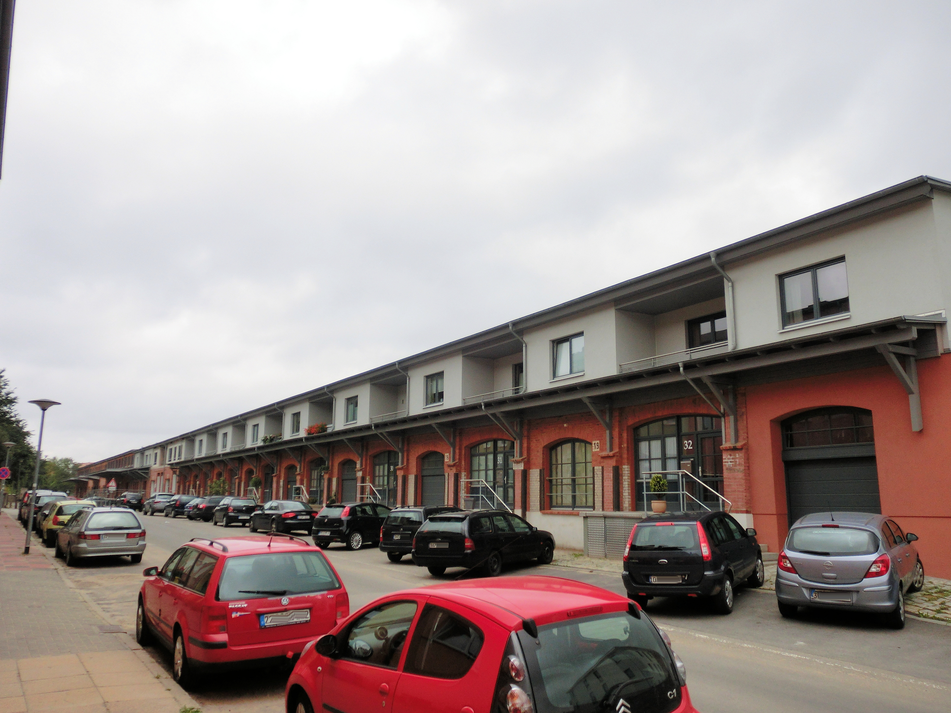 Rostock Bahnhofstrasse 13-32, Baudenkmal